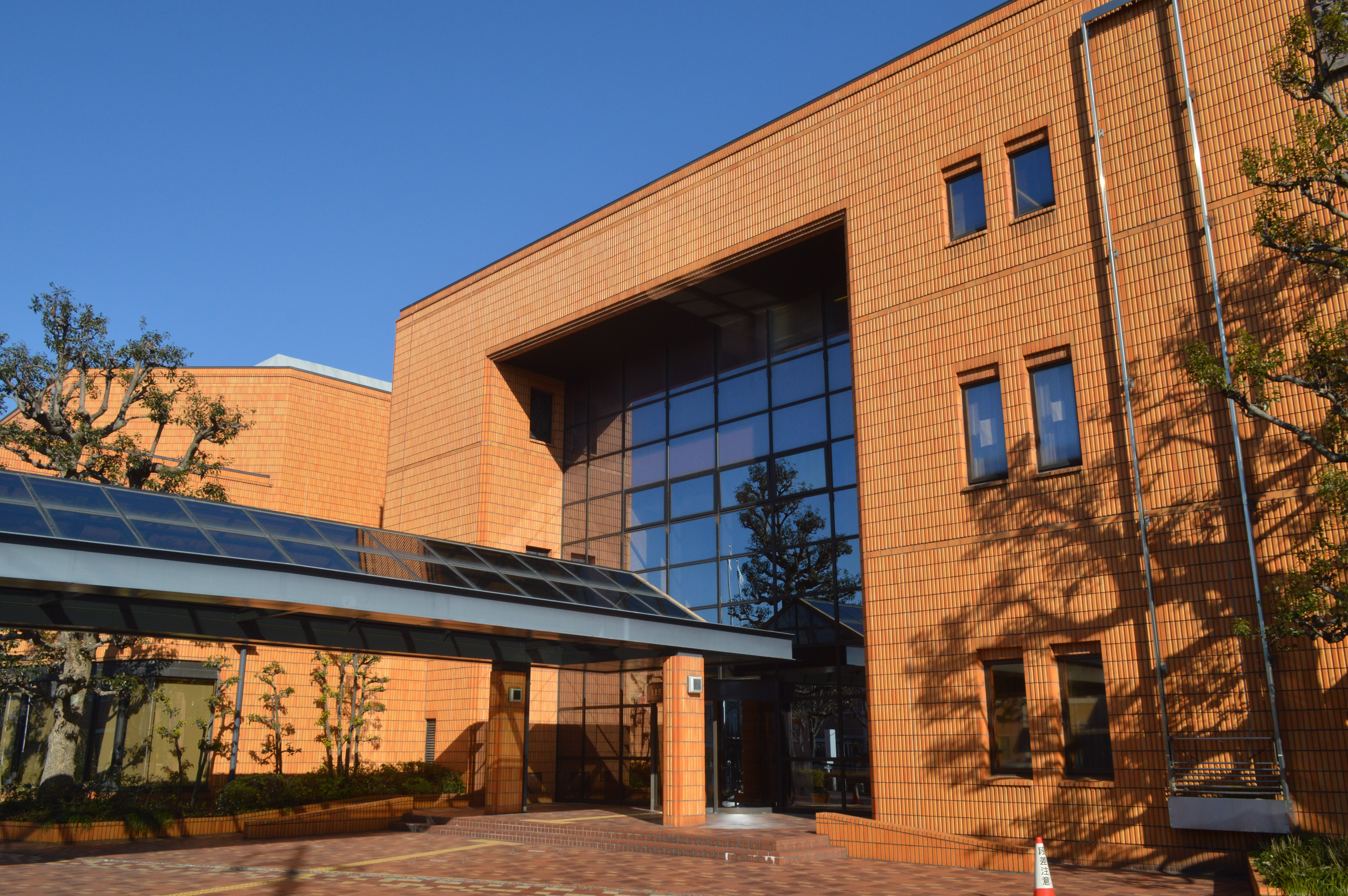 愛知県あま市にあるあま市甚目寺公民館。